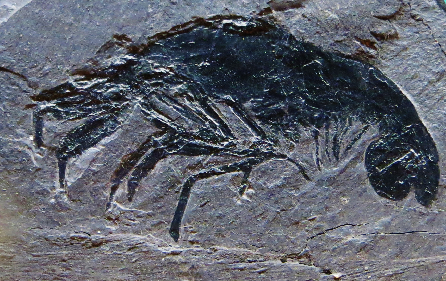 Fossil of Pseudoglyphaea, an extinct crustacean- Took the picture at Museo di Storia naturale “Antonio Stoppani” - Venegono Inferiore